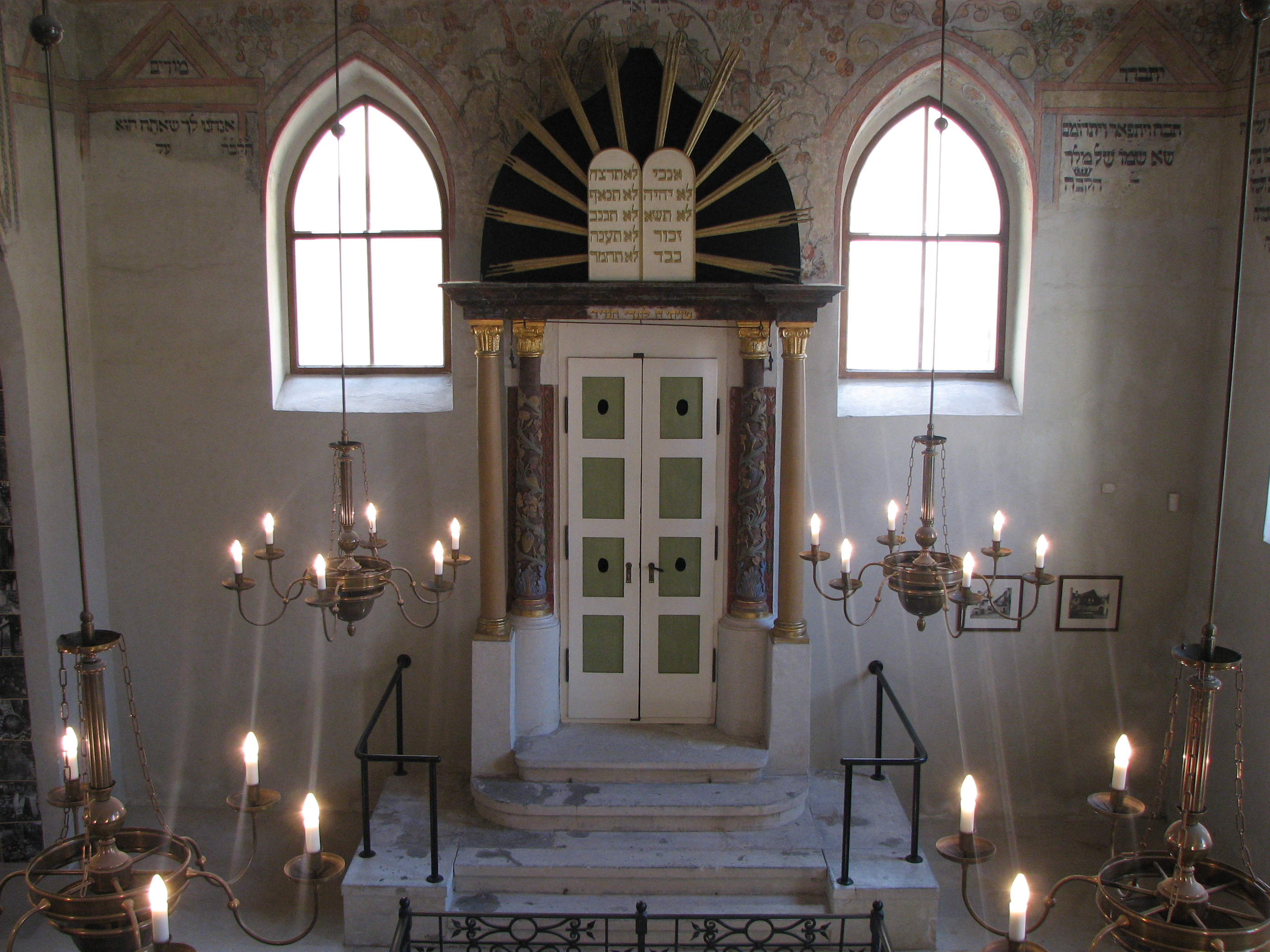 Synagoga (Boskovice), U templu, Boskovice, Boskovice.